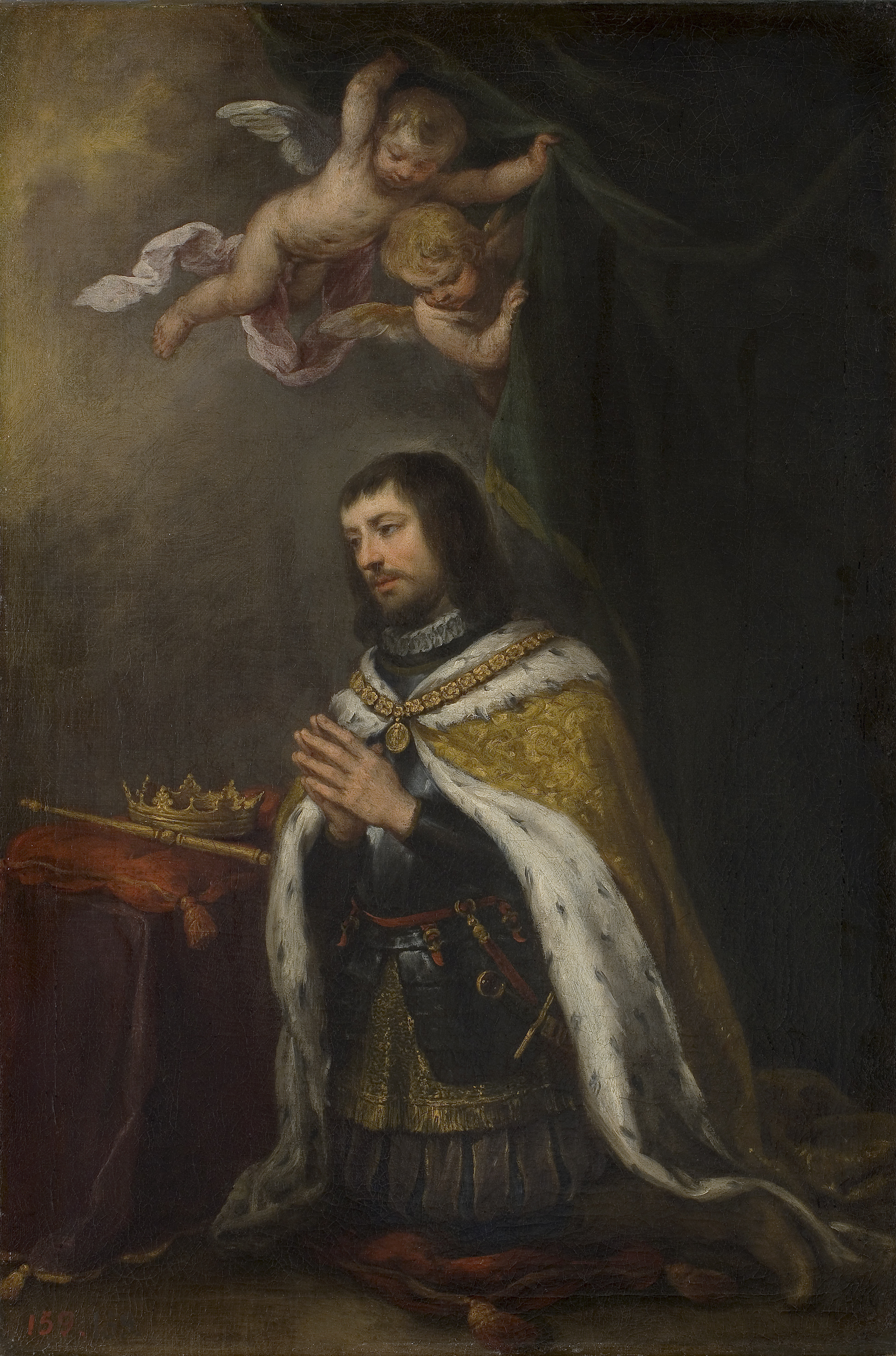 Fernando III el Santo († 1252), rey de Castilla y León y canonizado en 1671, aparece arrodillado y en oración sobre un cojín de terciopelo carmesí con borlas en los ángulos. Sus están juntas y su cabeza un tanto inclinada hacia adelante, en actitud devota. Representa este retrato imaginario al personaje con una edad comprendida entre los 30 y los 35 años. Tiene el cabello largo por los lados y cortado sobre la frente, a la usanza del siglo XV y no como era habitual en el siglo XIII; y barba juvenil, poco crecida. Lleva sobre una tunicela con fleco de oro, una media armadura de acero, calzas y gregüescos, gorguera de abanillos, botas y un manto real de tisú de oro forrado de armiños, sujeto al pecho, con un collar de oro al cuello, del que pende una medalla de la Virgen; y sobre el reclinatorio que tiene delante están, en otro cojín, el cetro y la corona. Dos ángeles en lo alto retiran el cortinaje de la estancia para que vea el resplandor del cielo, propicio a su plegaria.